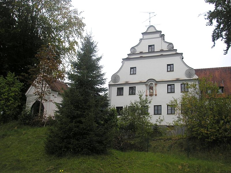 Weiherhof bei Döpshofen, Landkreis Augsburg, Bayerisch-Schwaben. Ansicht von Osten mit Kapelle. Eigene Aufnahme, Sept. 2006 / Weierhof near Doepshofen (Bavaria, Germany). View from the east with chapel. Own photo, Sept. 2006